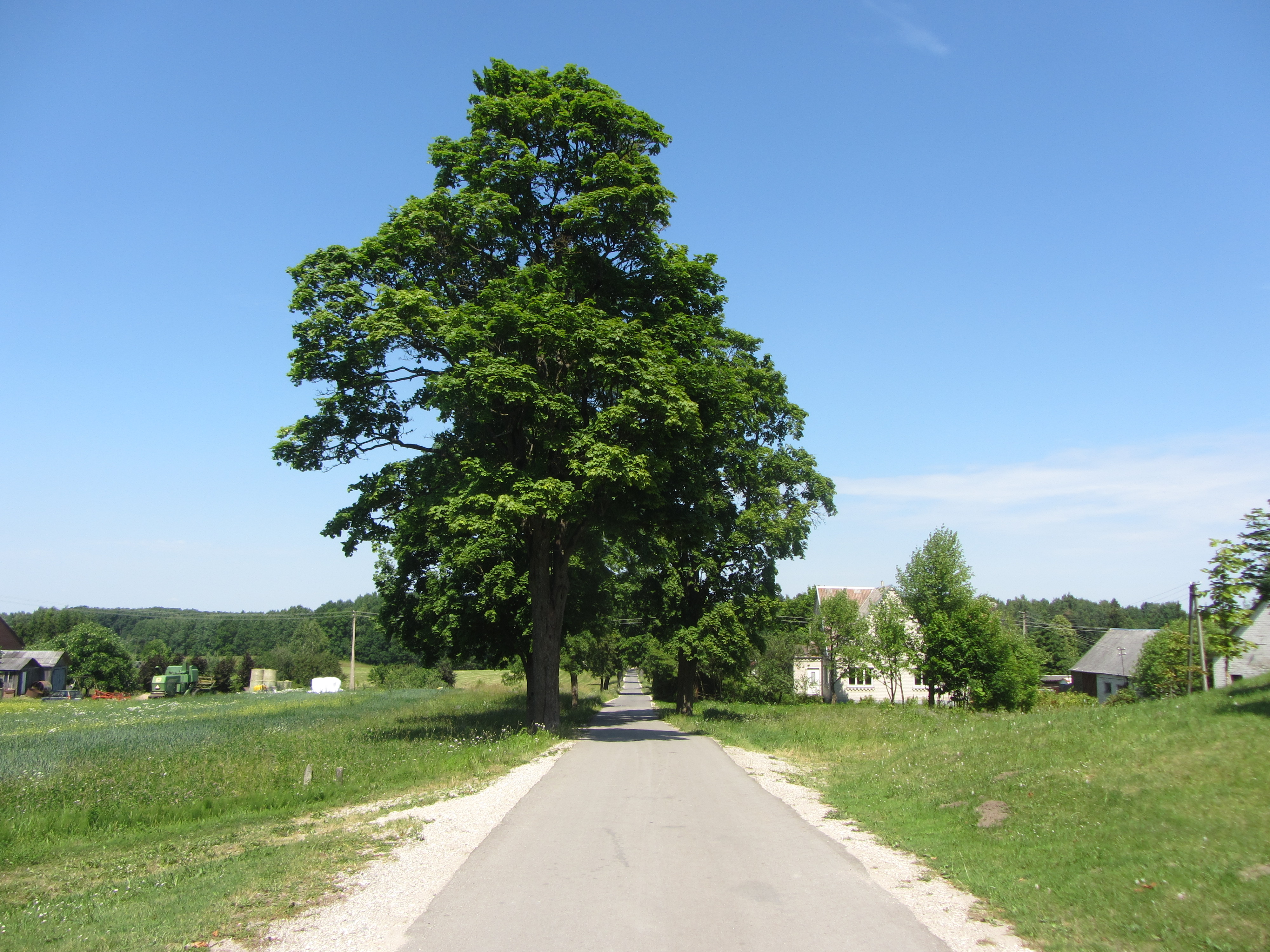 Lyduokiai, Lithuania